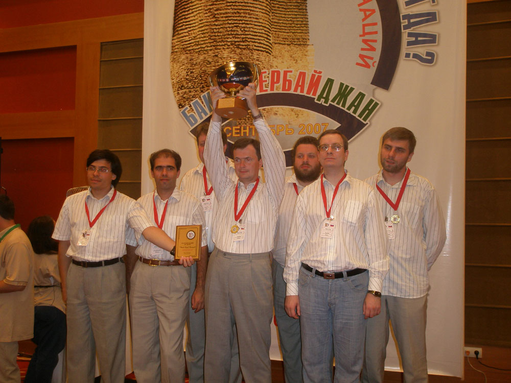 Команда России, выигравшая Кубок Наций. Баку